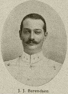 Ridder der Militaire Willemsorde 4e Klasse voor krijgsverrichtingen te Soemba en drager verzetsster. Later als luitenant-kolonel commandant geworden van het Korps Koloniale Reserve te Nijmegen.